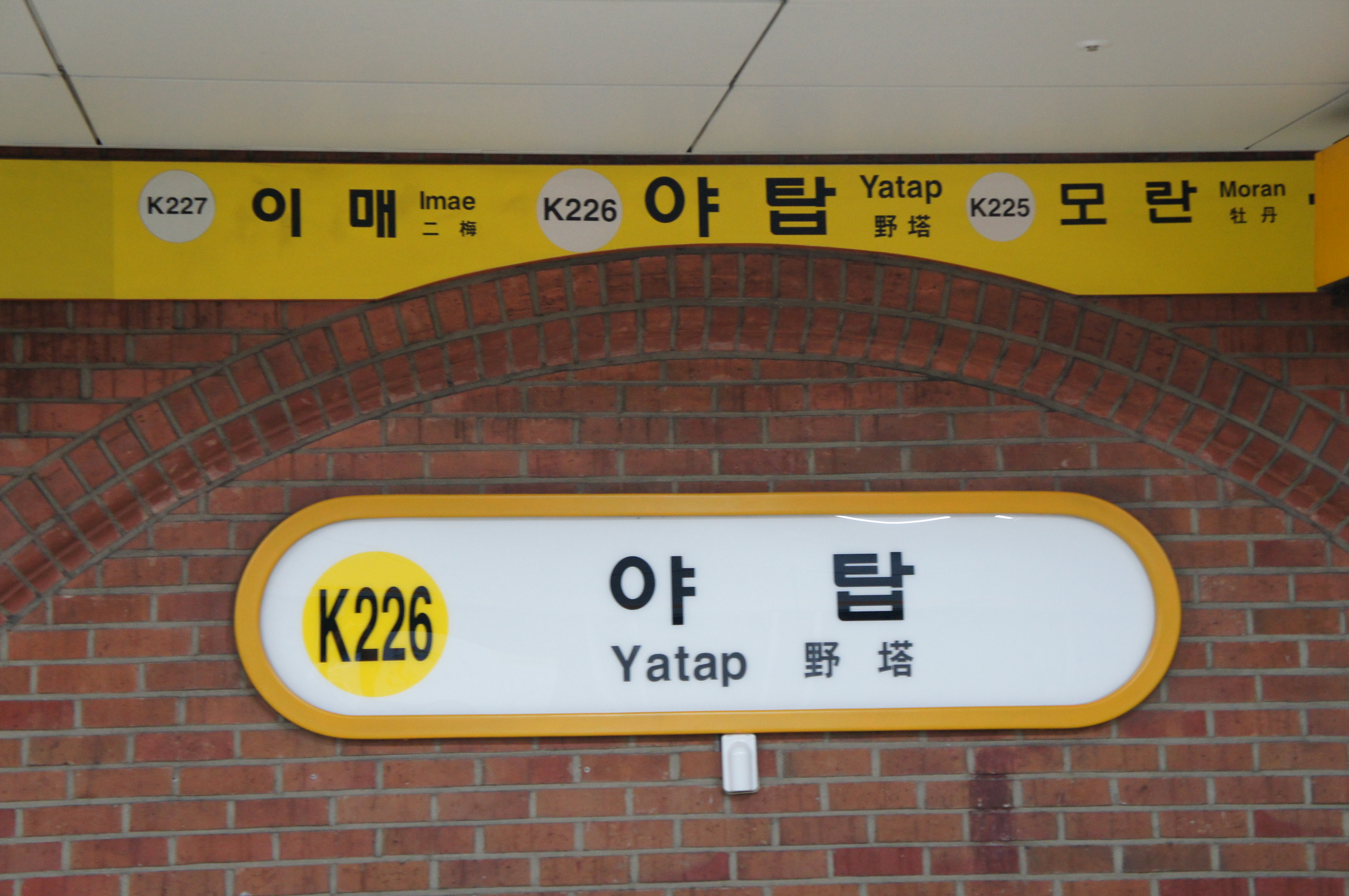 야탑역 역명판